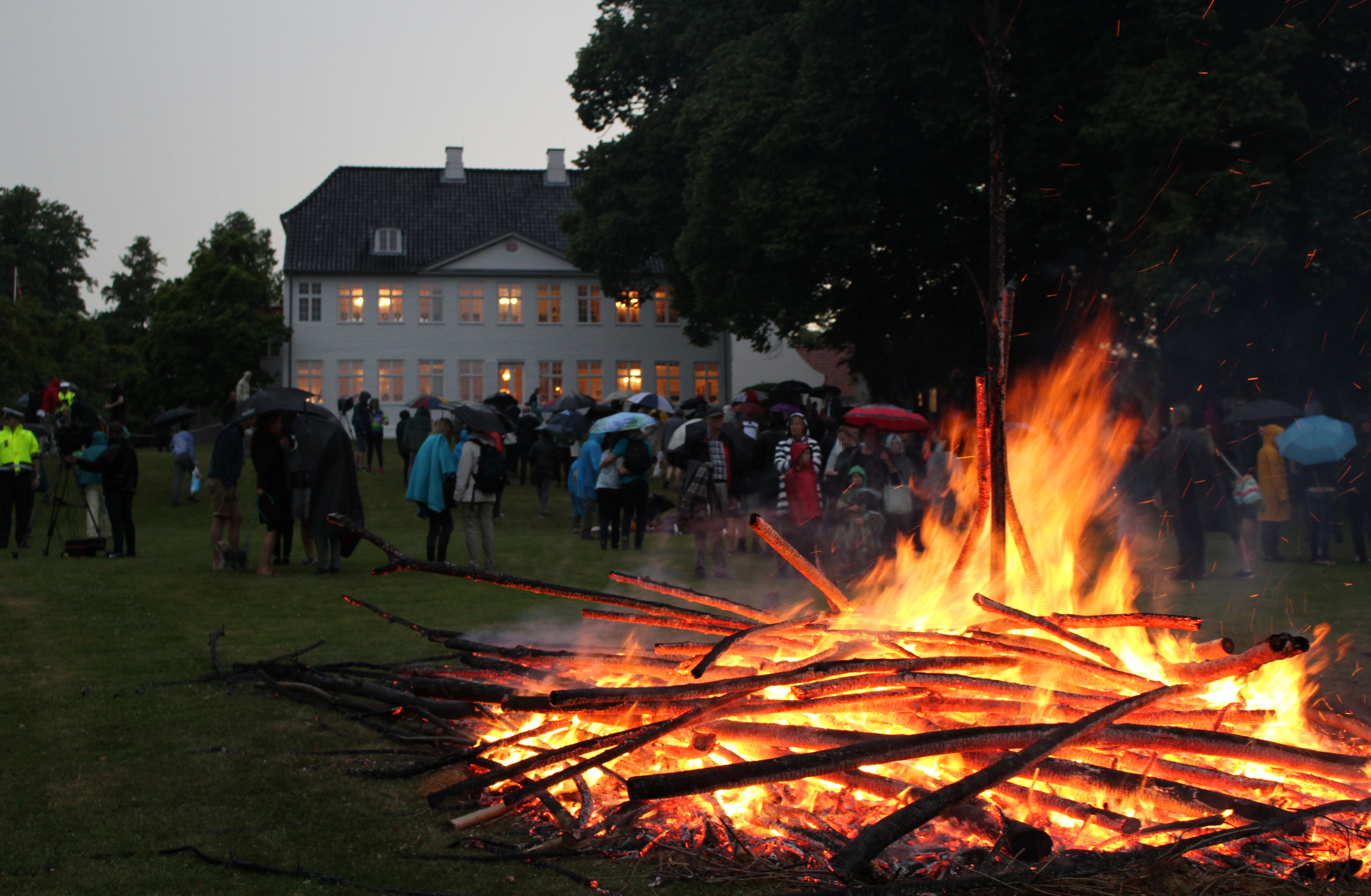 Sankthansaften i Marienborgs have med bål og publikum og Marienborg hovedbygningen i baggrund. Regnvejr.